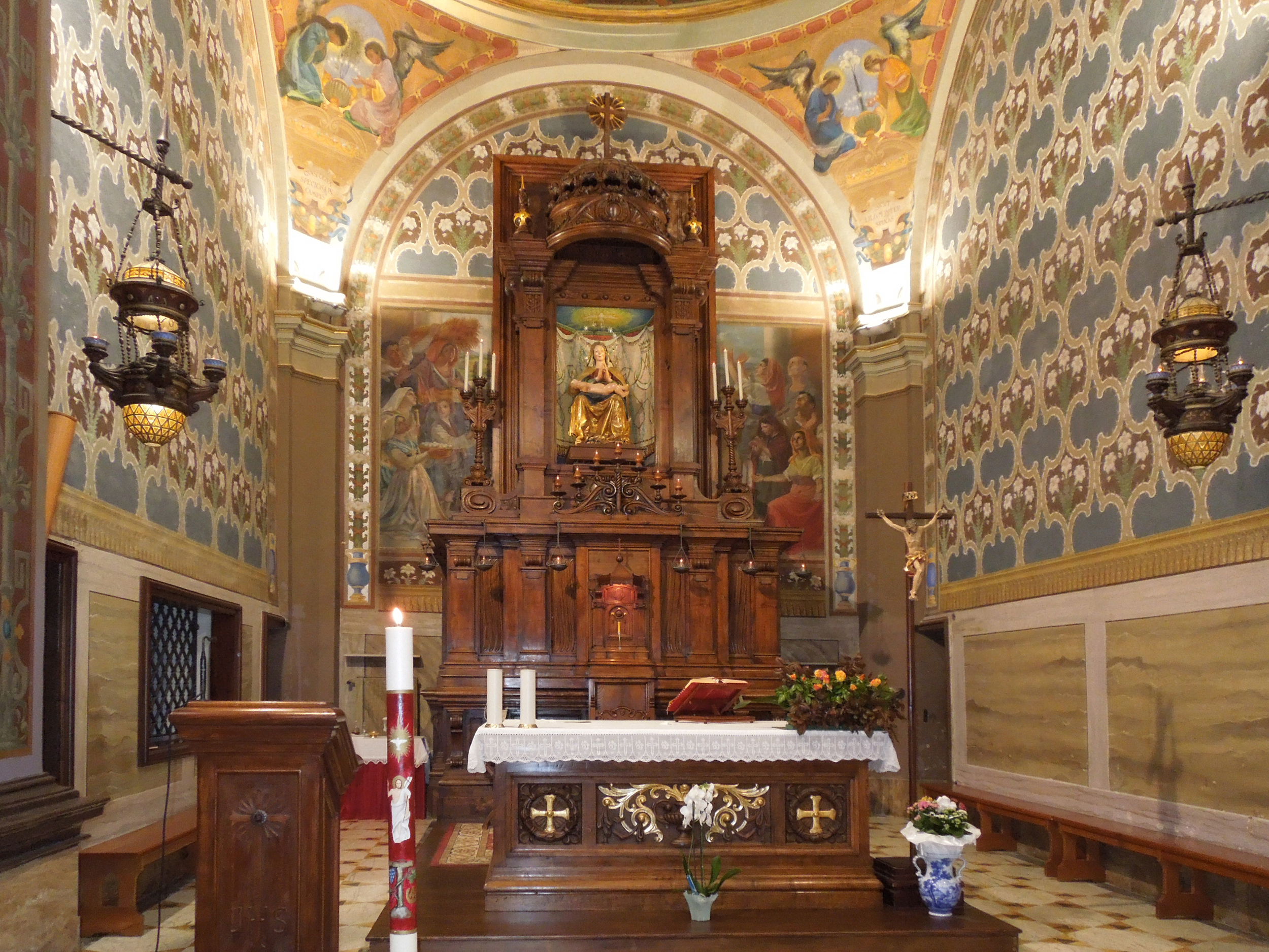 Presbiterio della chiesa della Madonna dei Lumi di Civitella del Tronto in provincia di Teramo.